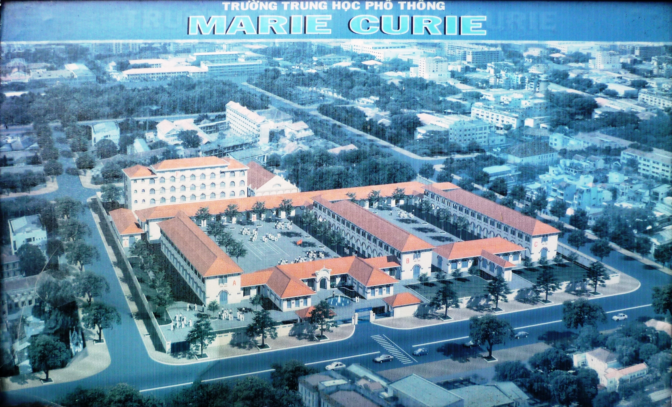 Hình vẽ phác họa toàn cảnh trường.